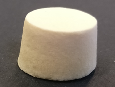 Cellulose-based aerogel